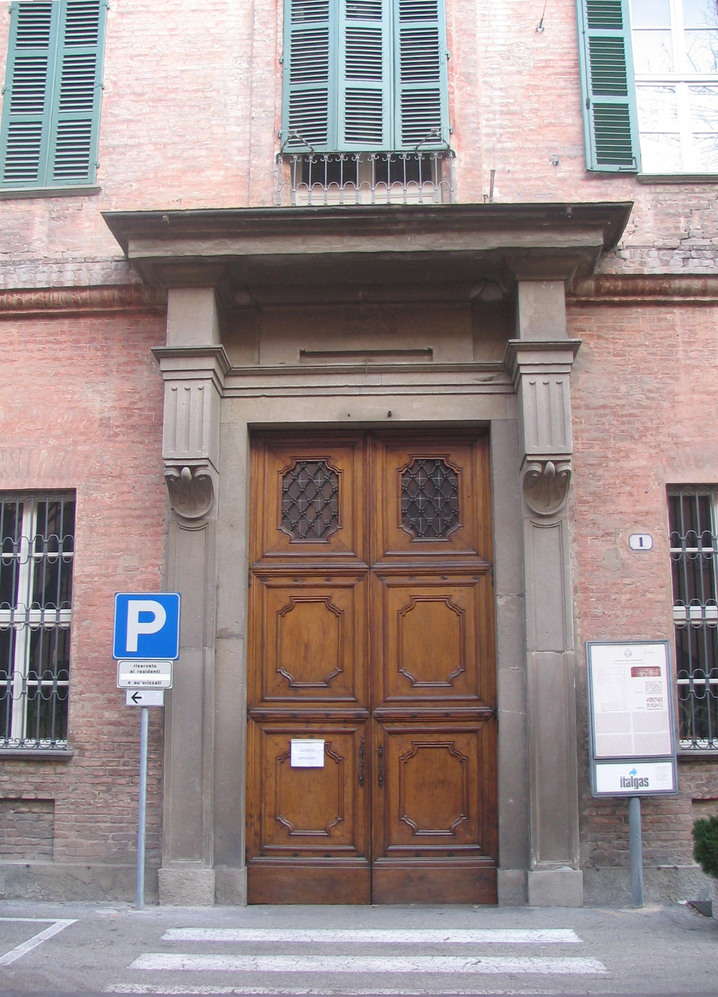 Seminario Vescovile Palace Asti